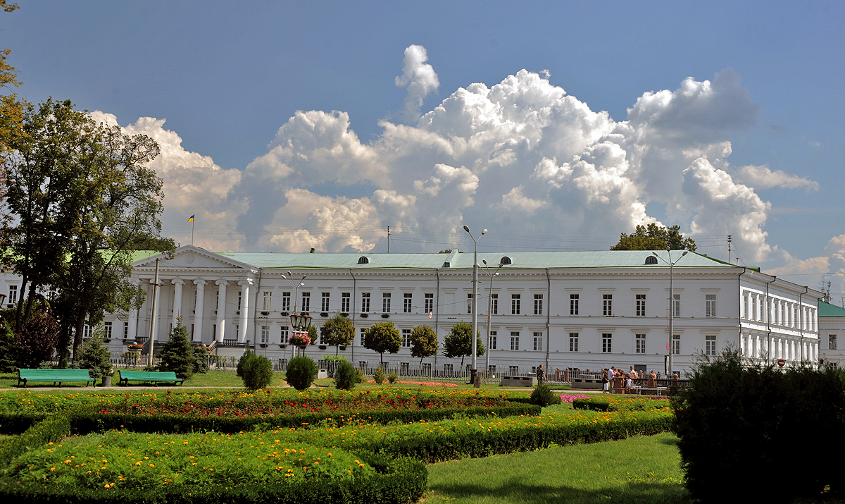 Полтавские достопримечательности